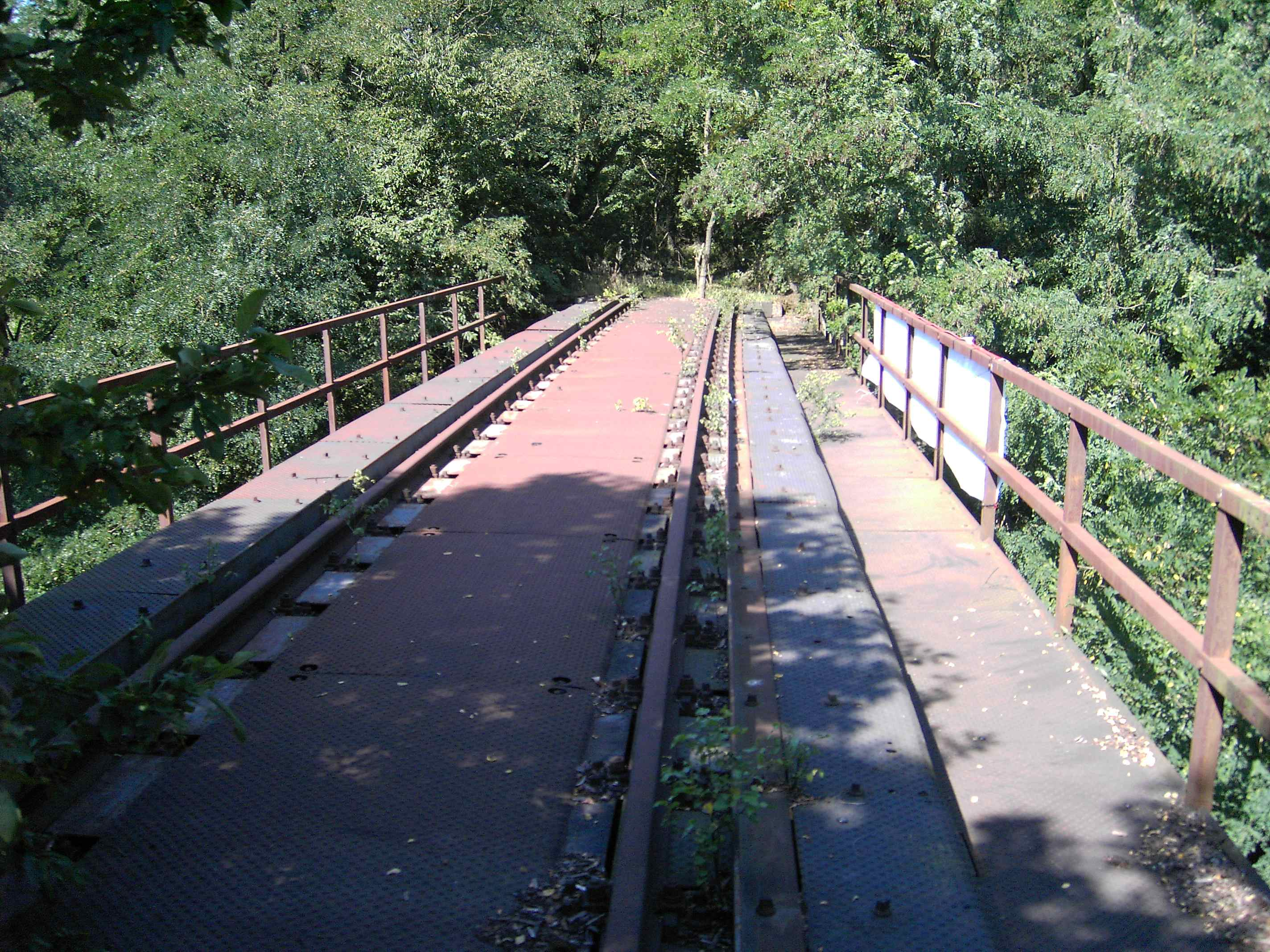 Brücke der Kanonenbahn bei Krofdorf-Gleiberg, in der Nähe der Straße "Im Augarten". Der Bahndamm ist fast vollständig überwuchert und nicht zu Fuß zugänglich.